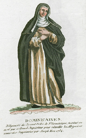 Collection de costumes de tous les ordres monastiques, supprimés à differentes époques, dans la ci-devant Belgique, Bruxelles, Philippe Joseph Maillart et sœur, 1811